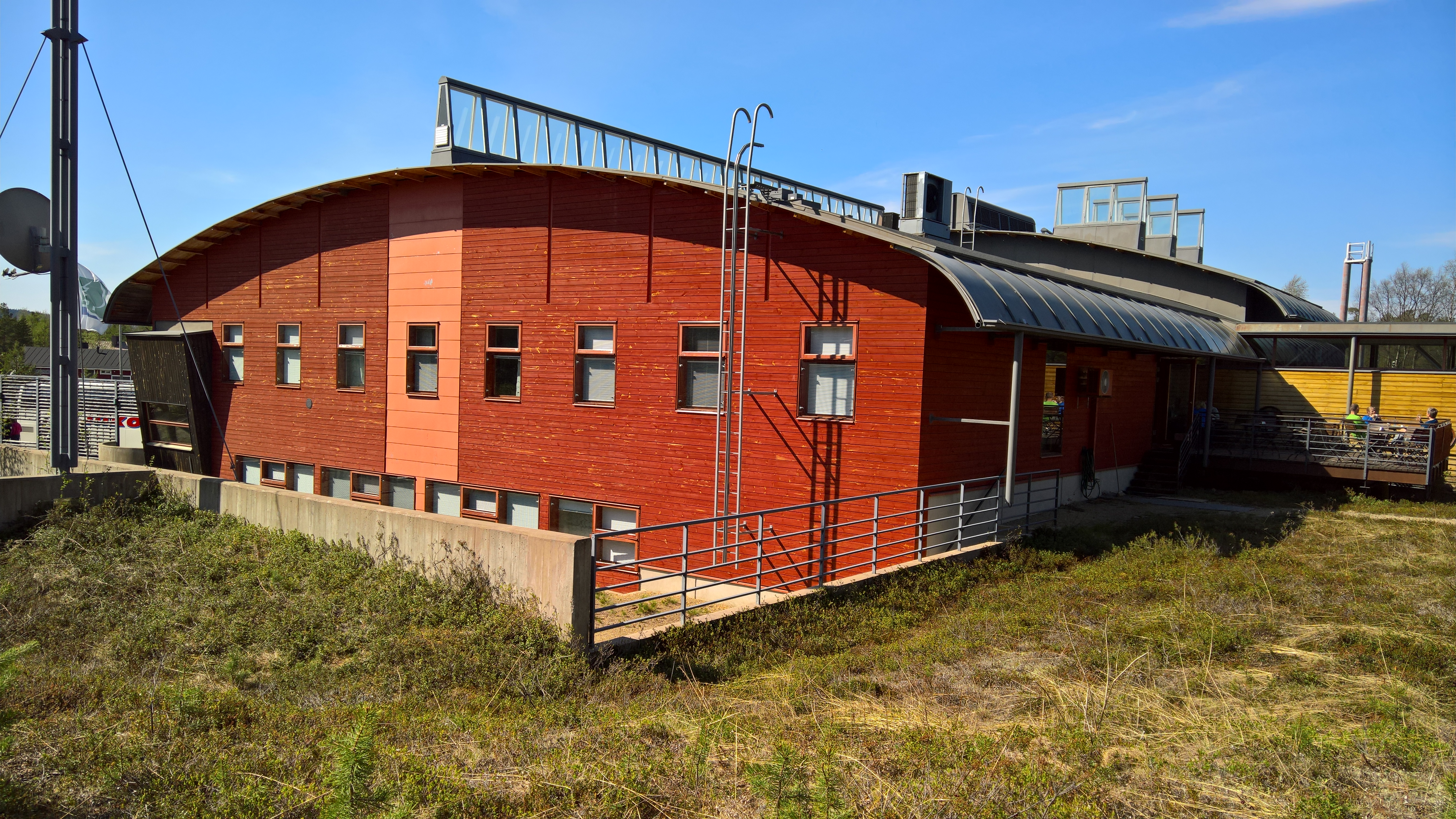 Siidan itäpääty